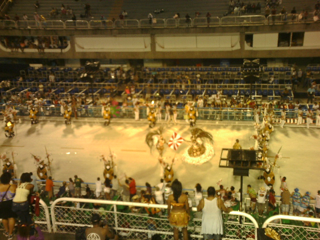 Comissão de frente da Unidos de Padre Miguel, 2011.